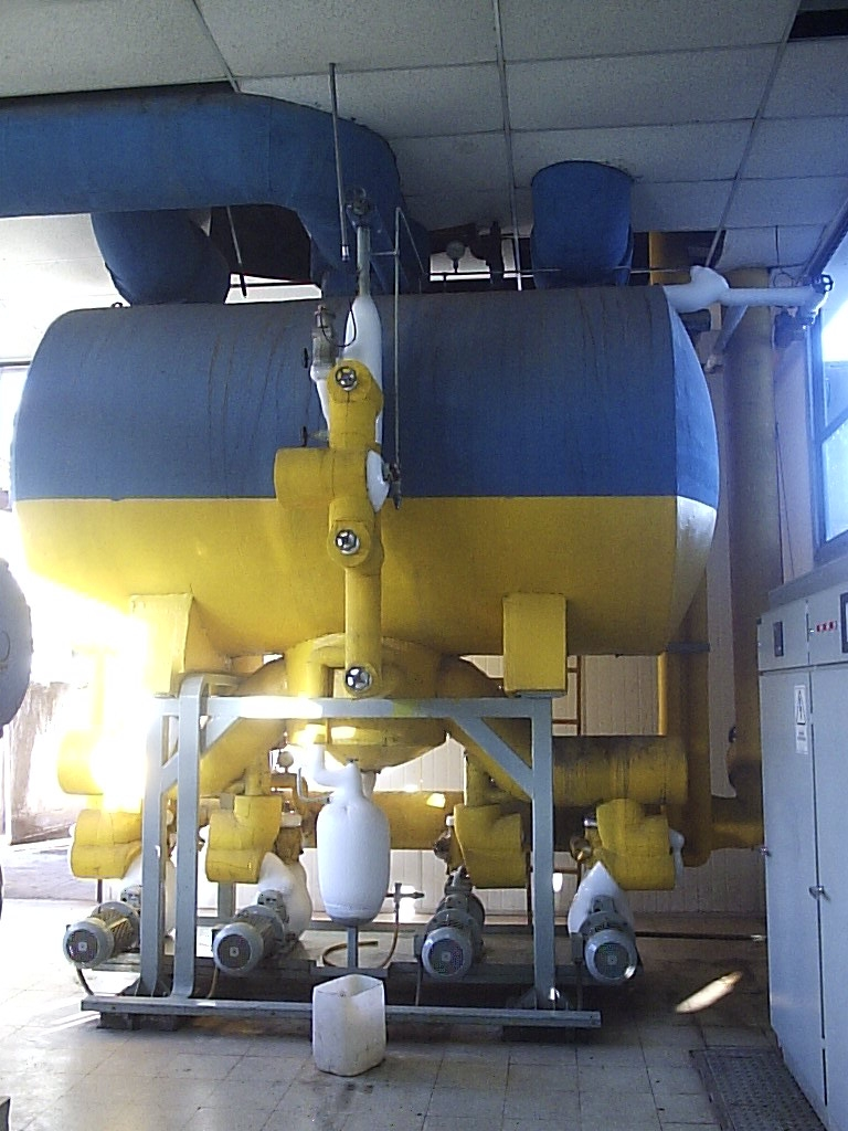 Estanque de recirculado para sistema frigorífico de amoníaco con recirculación mecánica de líquido. San Francisco de Mostazal, Chile